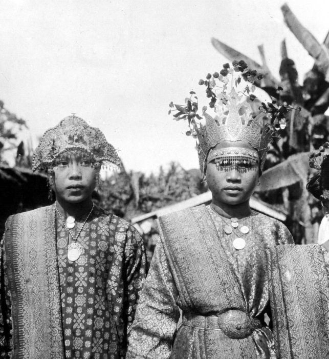 Negatief. Meisjes in adatkleding te Muaralakitan, Palembang, Zuid-Sumatra